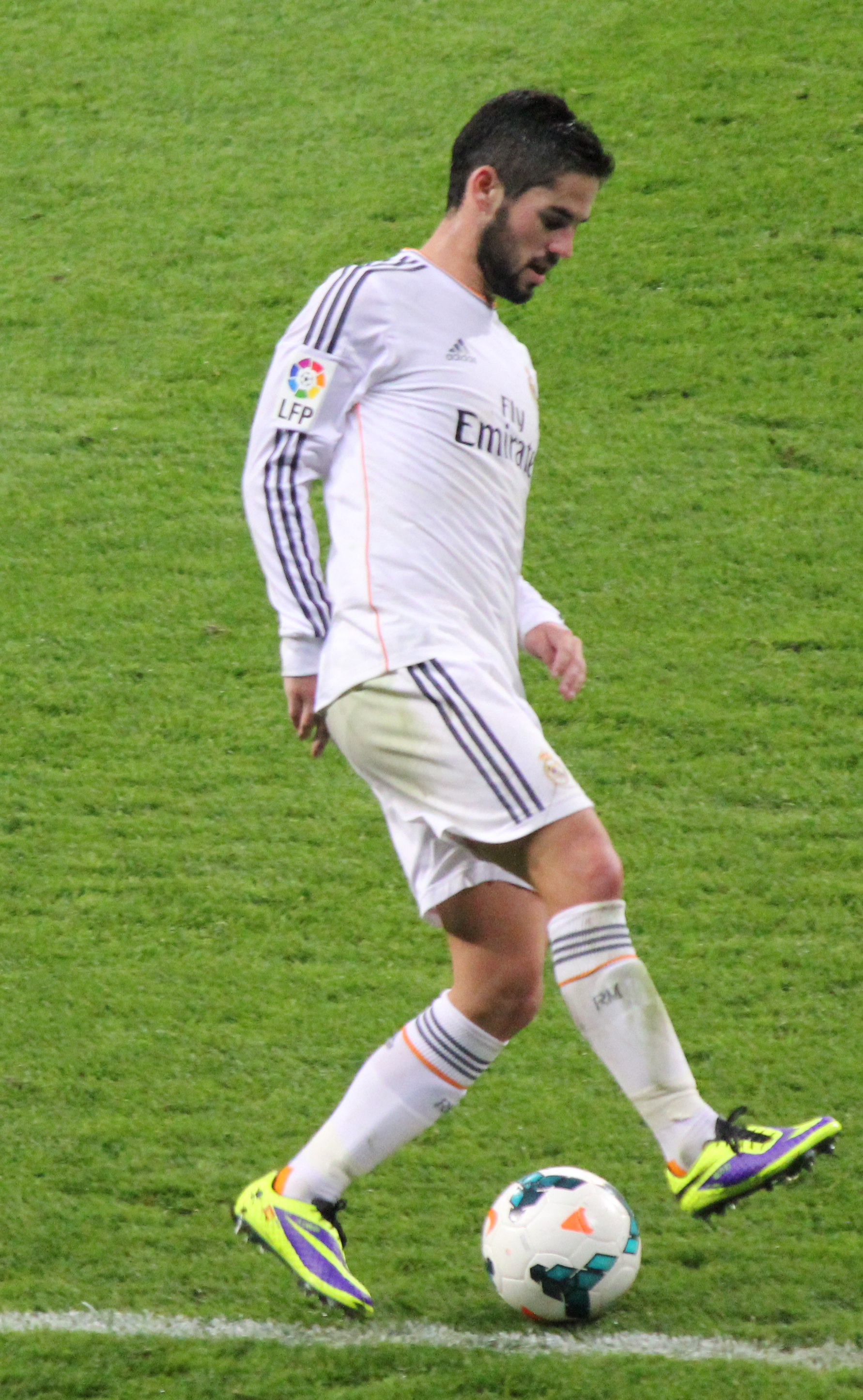 Isco (cropped)